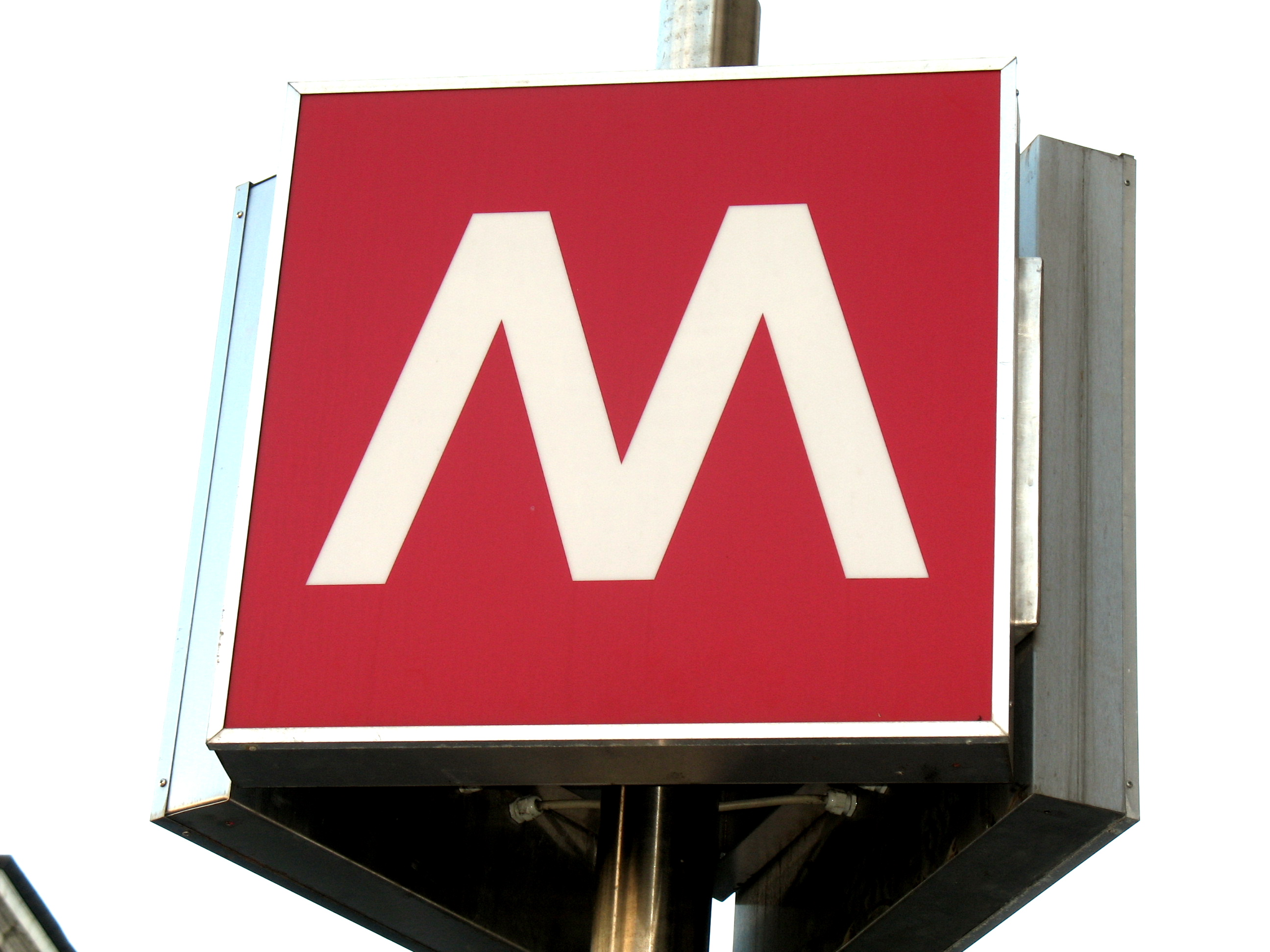 Metropolitana di Genova